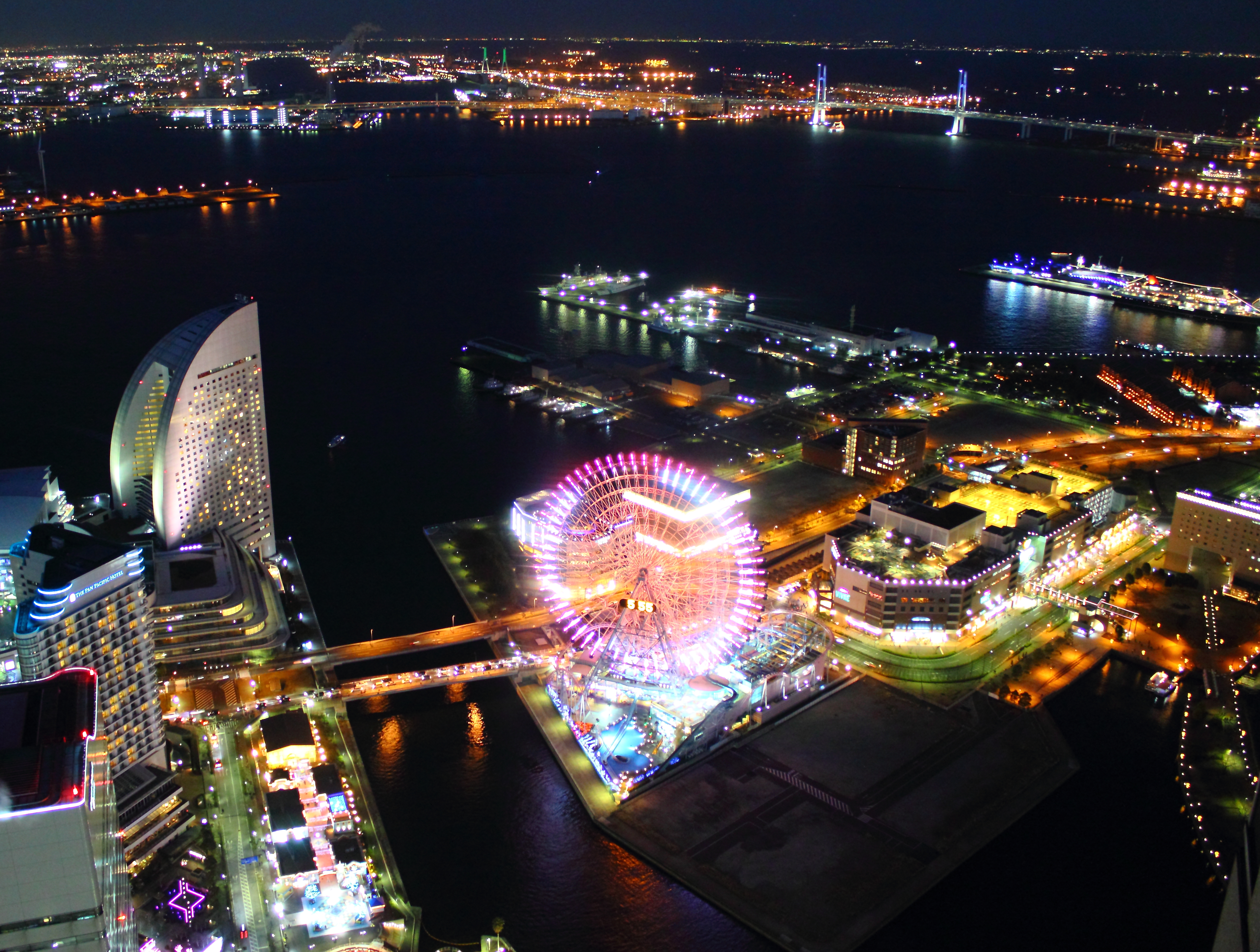 みなとみらい21夜景（ランドマークタワーより）